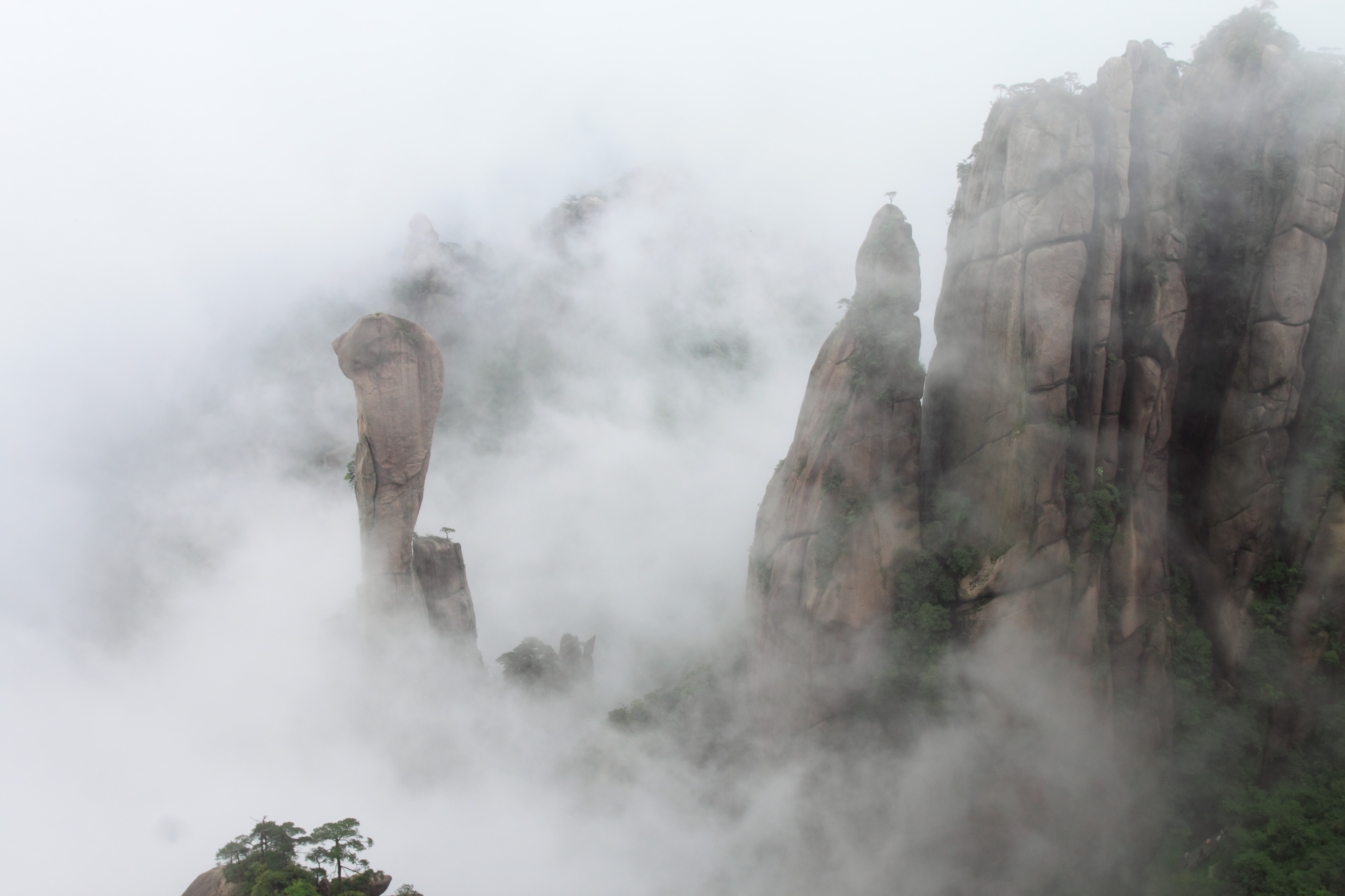 三清山 —— 东海岸栈道观巨蟒出山